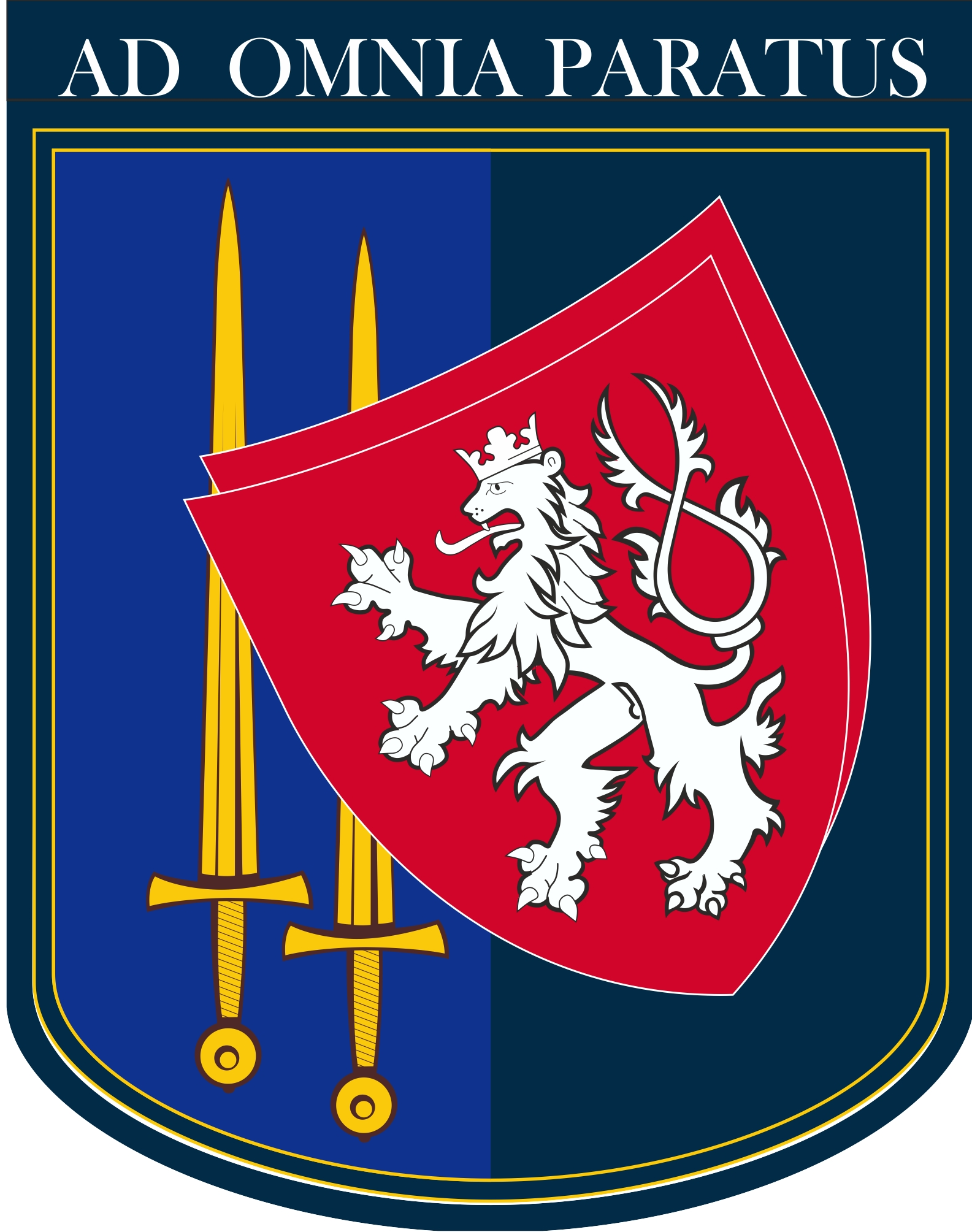 Oficiální znak Útvaru pro ochranu ústavních činitelů ochranné služby Policie ČR